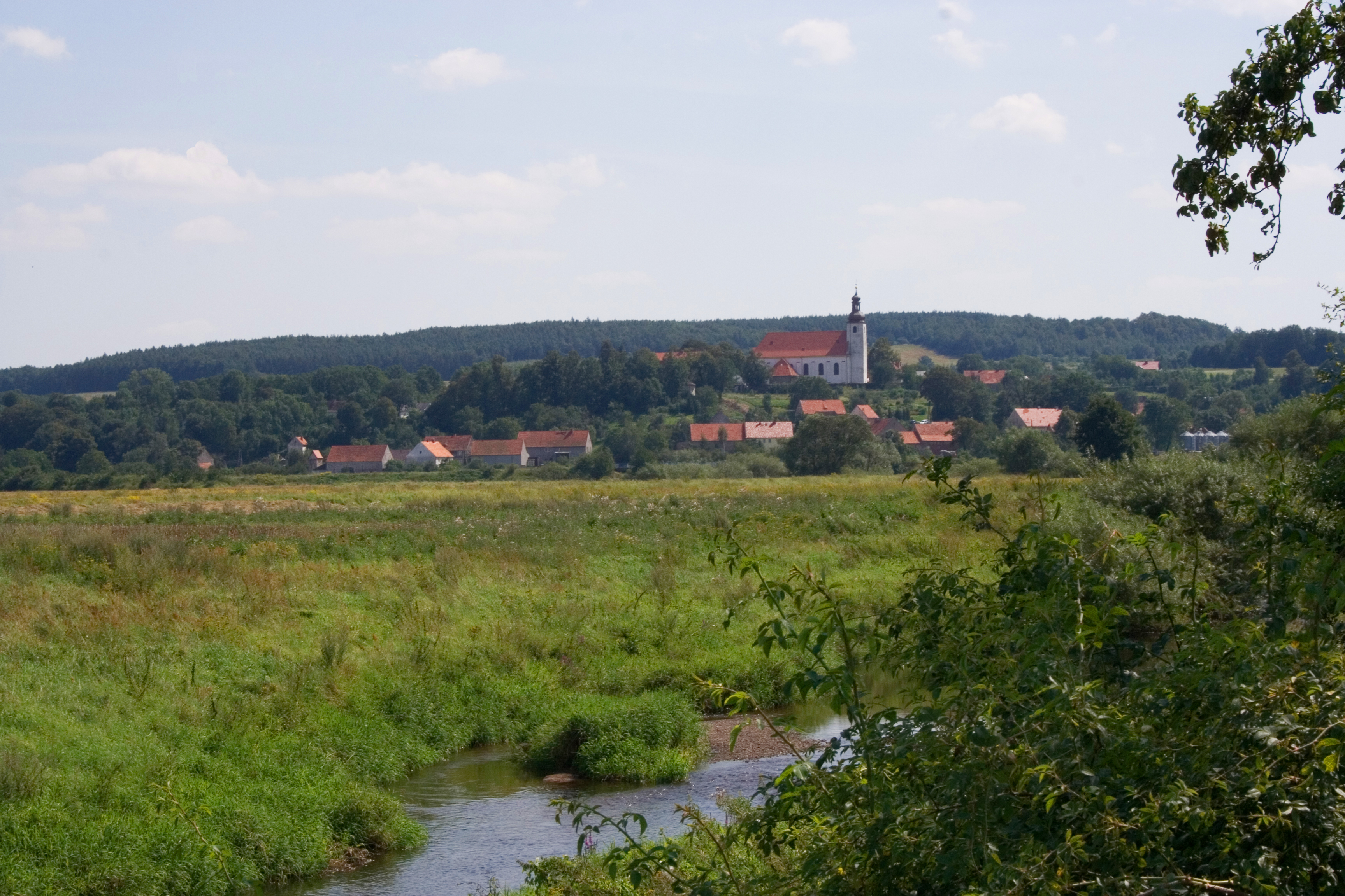 Słup - widok wsi od strony zachodniej